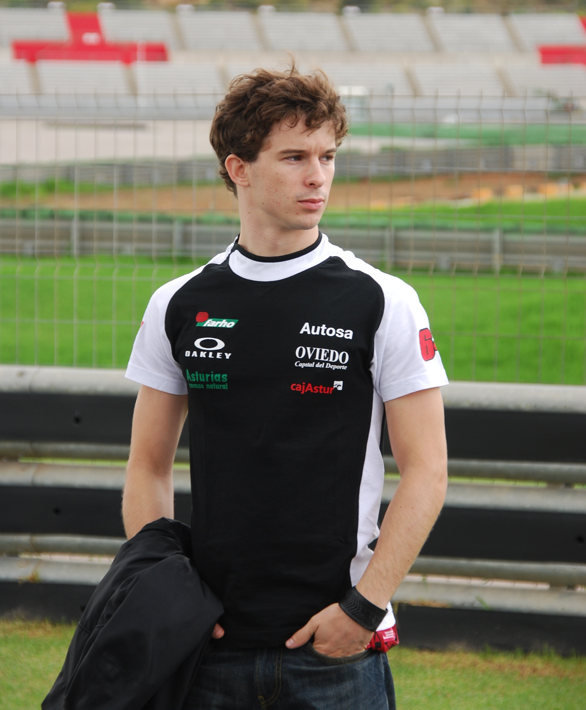 Nascar Europea 2012 Cheste